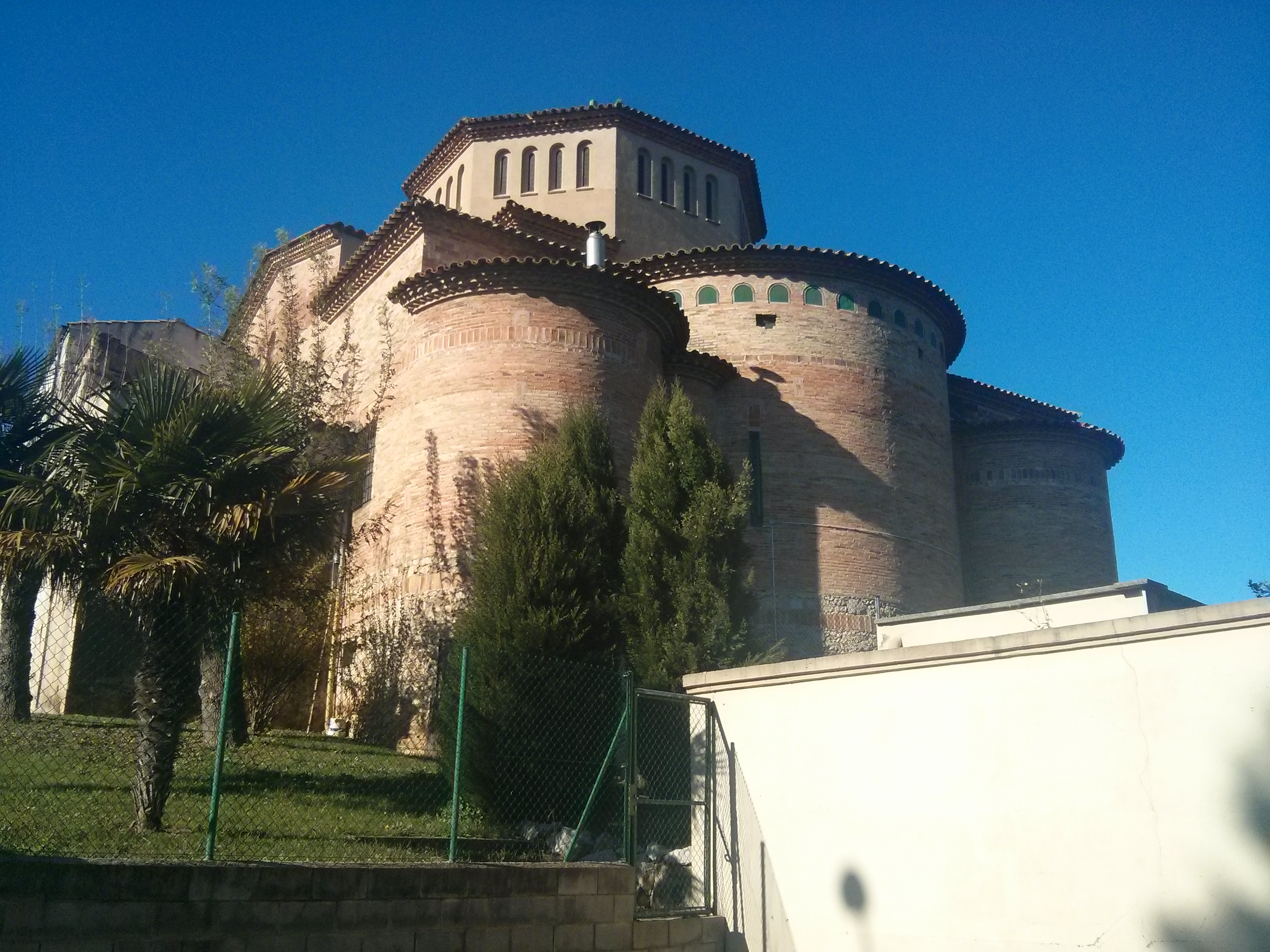 Església de Sant Miquel (Girona)